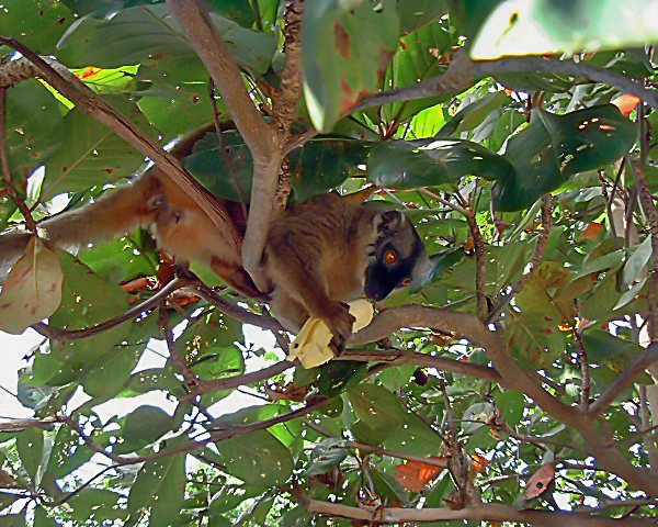 Maki de Mayotte (Eulemur fulvus) Auteur : Jérôme G Mayotte août 2006